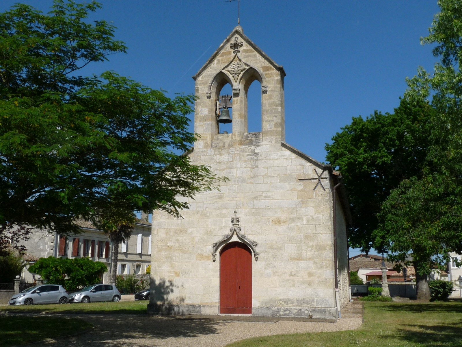 Eglise des Billaux, Gironde, France